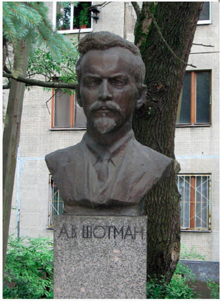 Alexander Schottmanin patsas Pietarissa